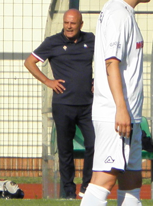 Abano Terme, Stadio delle Terme: 16 giugno 2018, spareggio UEFA Women's Champions League; il coallenatore della Fiorentina Sauro Fattori mentre segue dalla panchina le fasi di gioco.